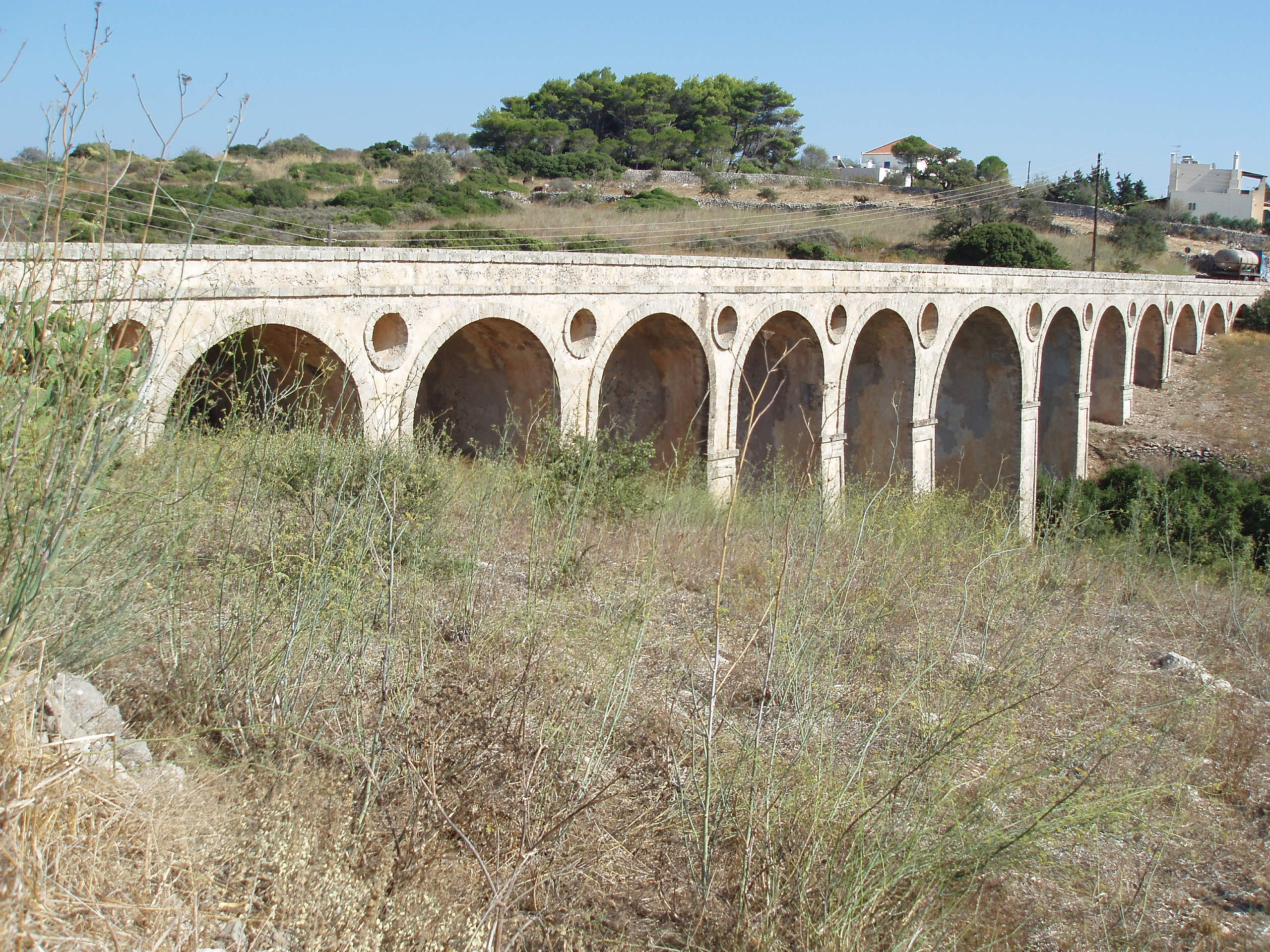 Katouni-Brücke auf Kythira